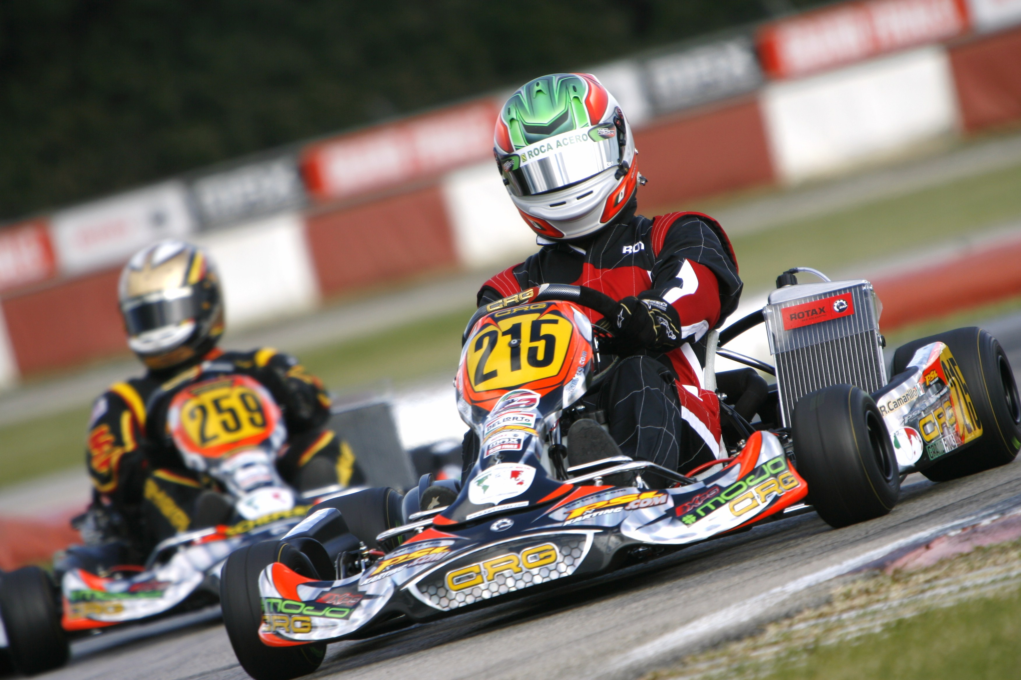 Rotax Max DD2 Kart